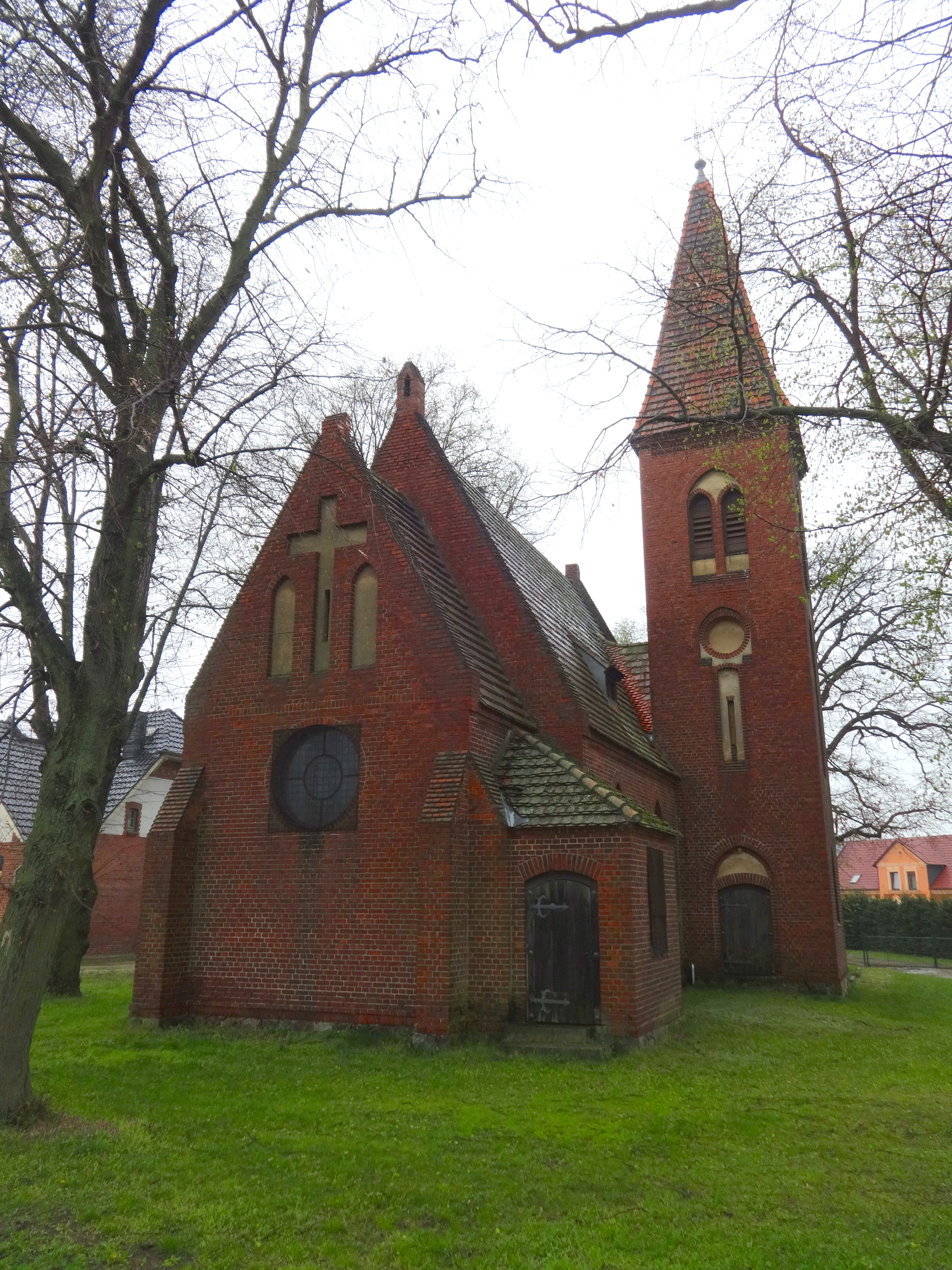 Die Dorfkirche in Rottstock ist eine neugotische Saalkirche in Rottstock, einem Ortsteil der Gemeinde Gräben im Landkreis Potsdam-Mittelmark in Brandenburg. Auffällig ist der an der Nordseite asymmetrisch positionierte Turm.